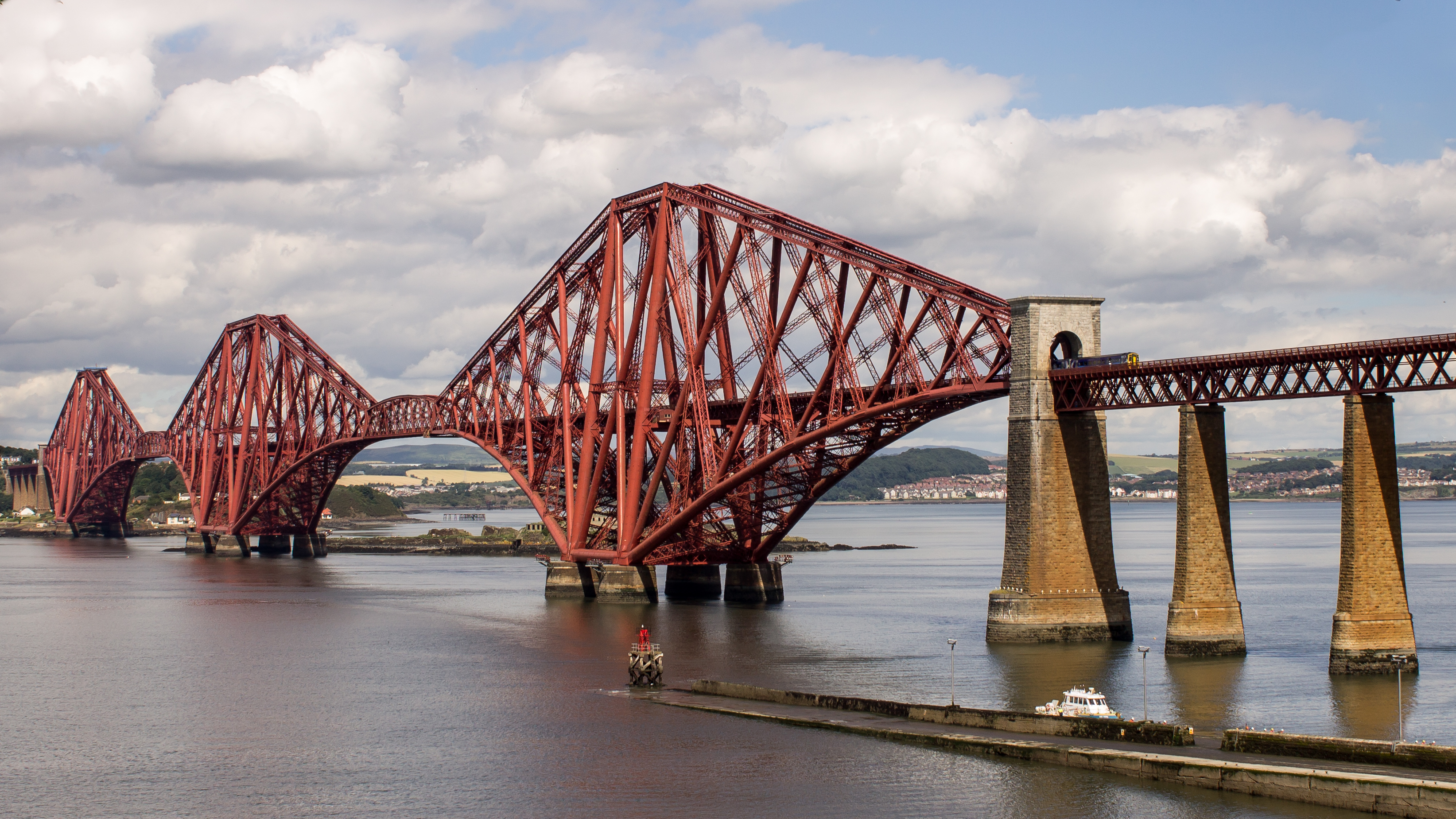 De concessie van Scotrail, de Schotse Spoorwegen, is tegenwoordig in handen van Abellio. Zo zien we hier een, soort van dan, NS-trein over de Fifth of Forth Railway Bridge heen denderen, onderweg naar Edinburgh Waverley. De brug, 2,5 km lang en ruim 100 meter hoog, is een icoon voor Schotland, en is niet heel lang geleden op de UNESCO-lijst gezet.